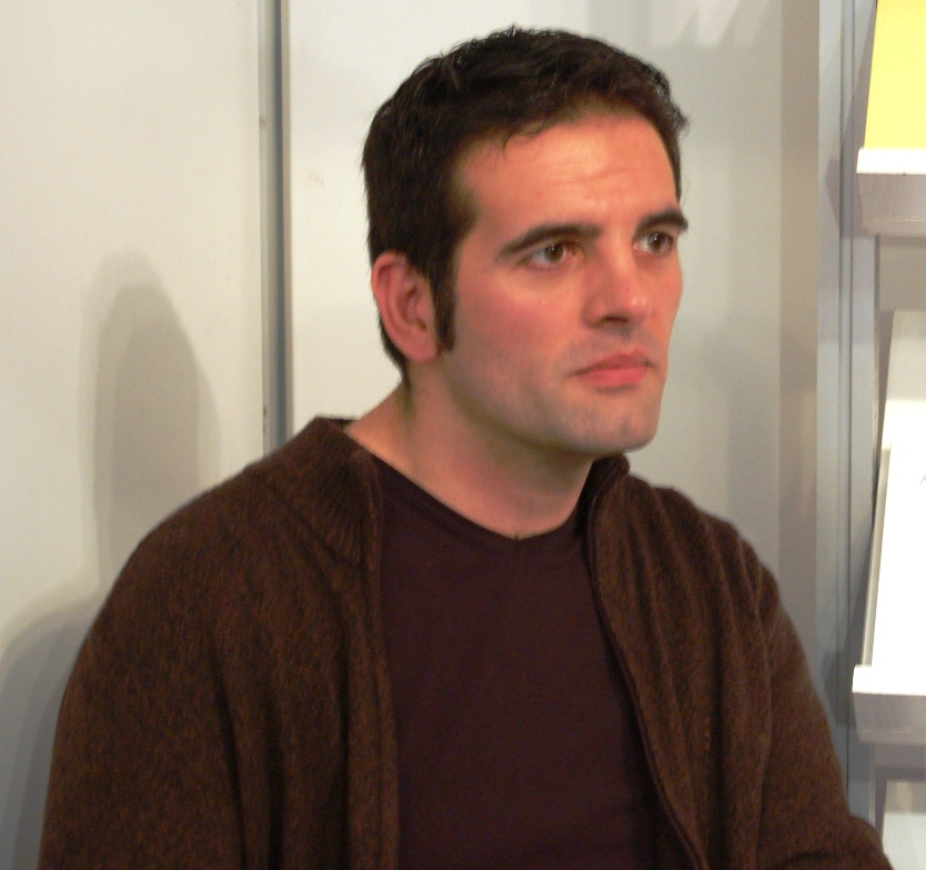 Xosé Antón Neira Cruz asinando exemplares dos seus libros no CulturGal